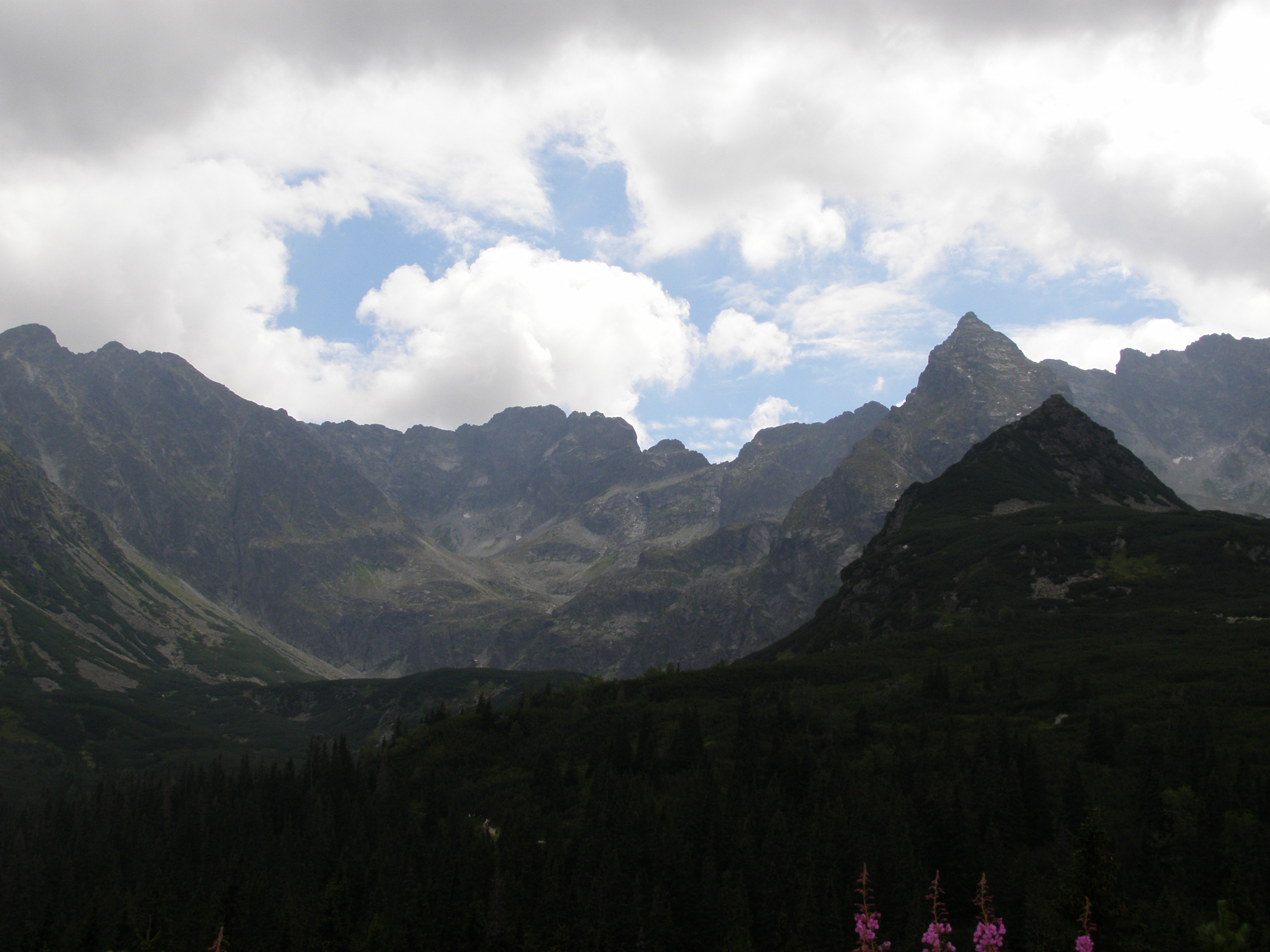 Widok na Tatry Wysokie z Hali Gąsienicowej